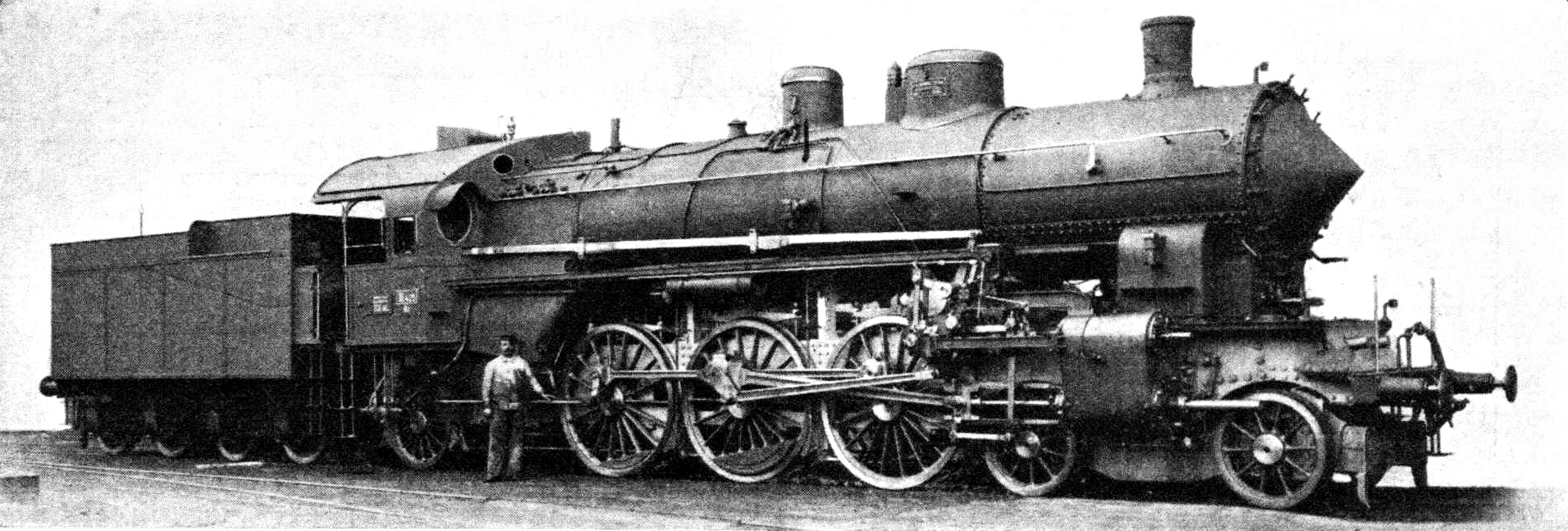 A MÁV 301 sorozatú mozdonya ikergépezettel